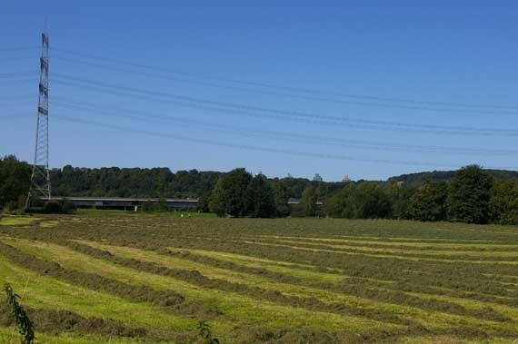 Landwirtschaft (Wiesennutzung) im Ruhrauenbereich in Westherbede (Witten), Hintergrund A43